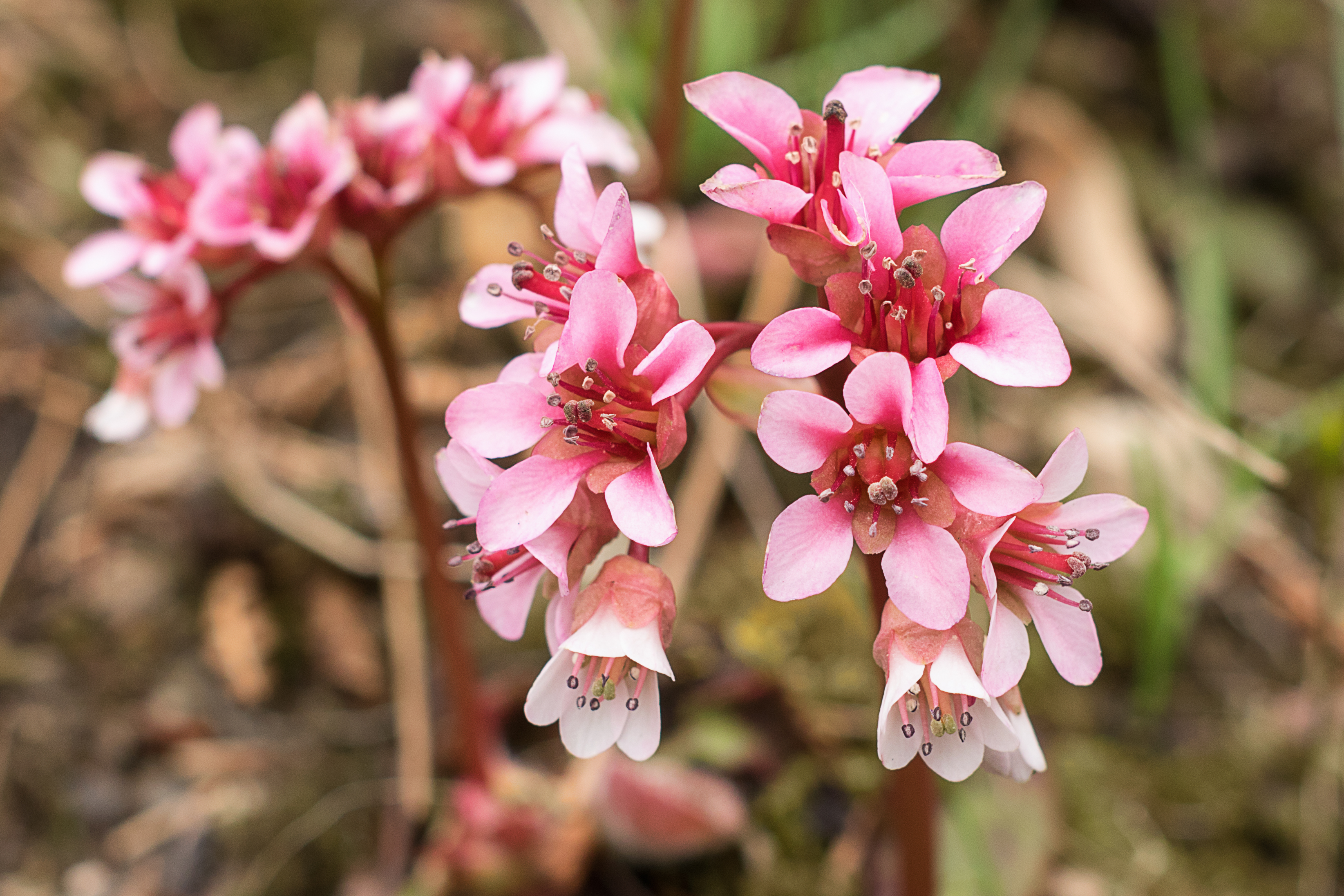 Blüten einer Kaschmir-Bergenie (Bergenia ciliata) im Alten Botanischen Garten der Georg-August-Universität Göttingen